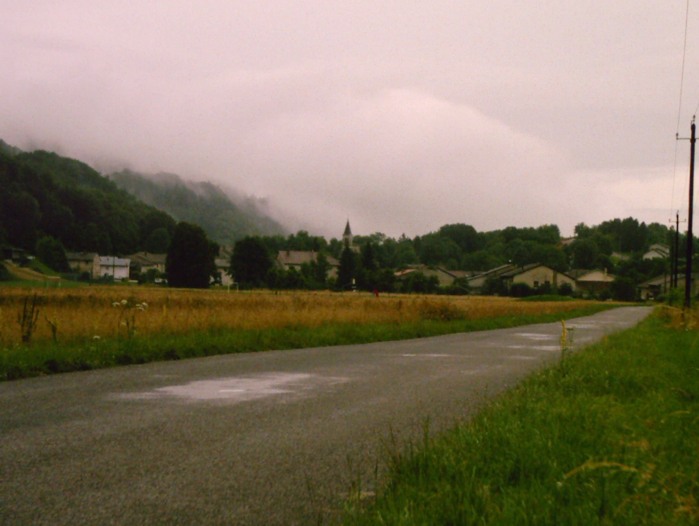 Vue général de Ceignes (Ain, FRANCE)